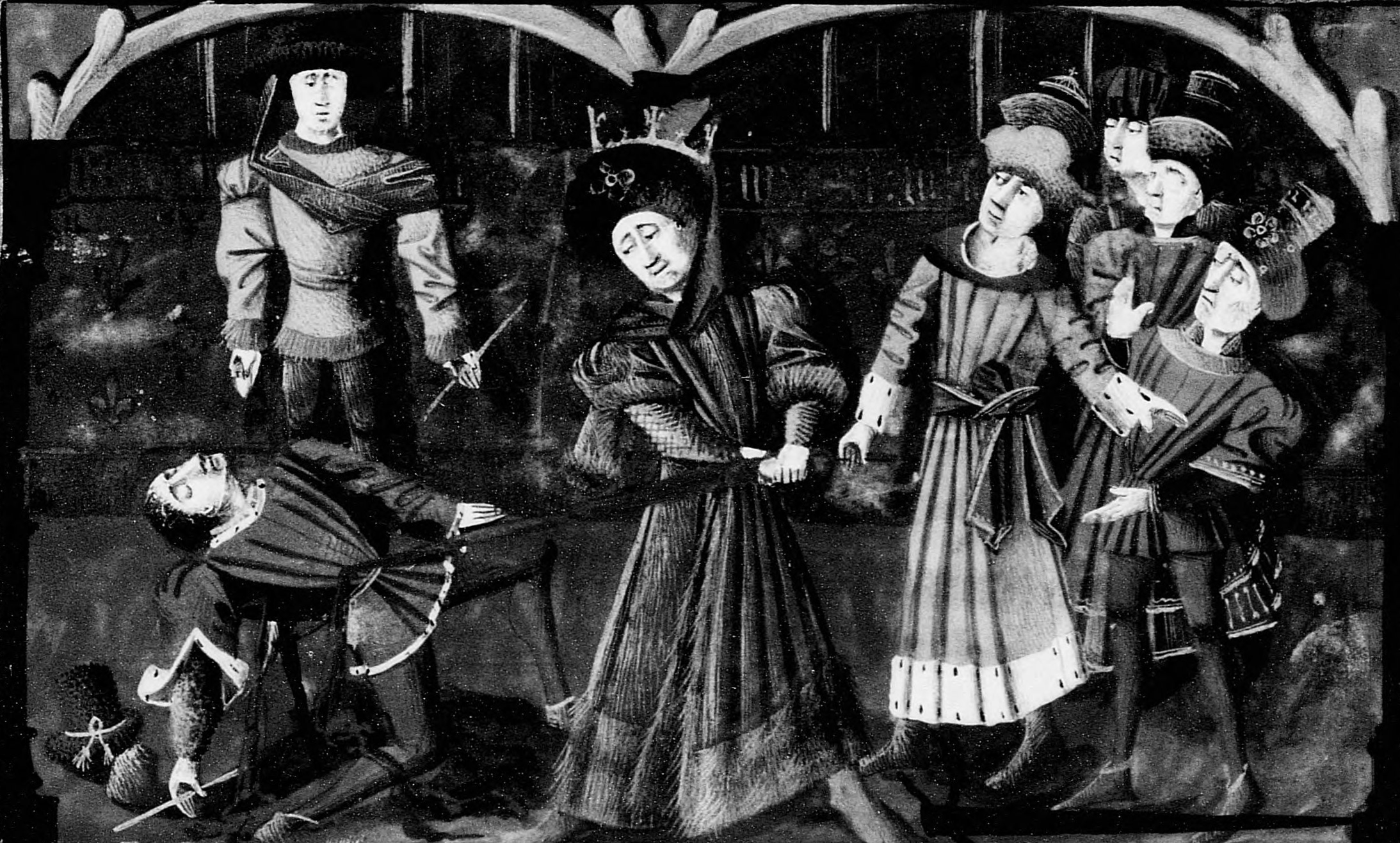 Assassinat de Sigewald, comte d'Auvergne par Thierry Ier, roi des Francs, en 532. Miniature d'un manuscrit des Grandes Chroniques de France. XVème siècle.